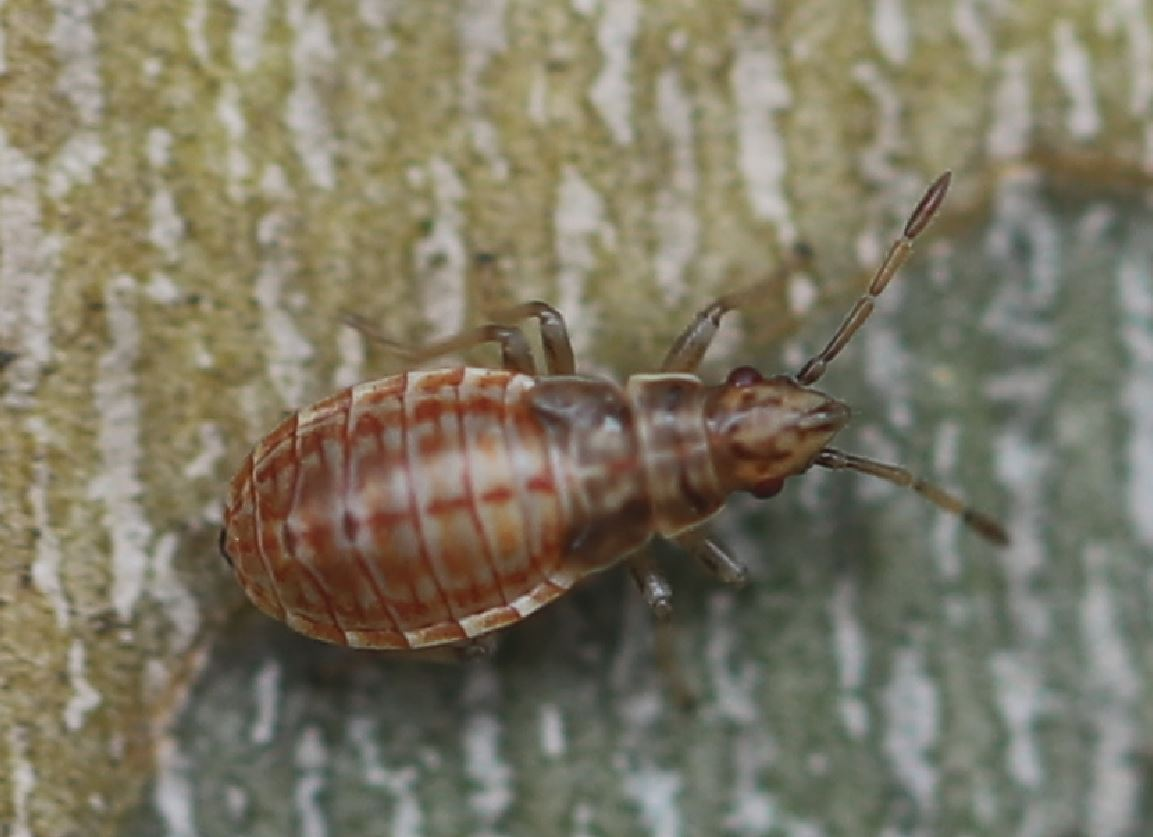 Wanzenymphe Arocatus longiceps am 16. Juni 2020 an einem Platanenstamm